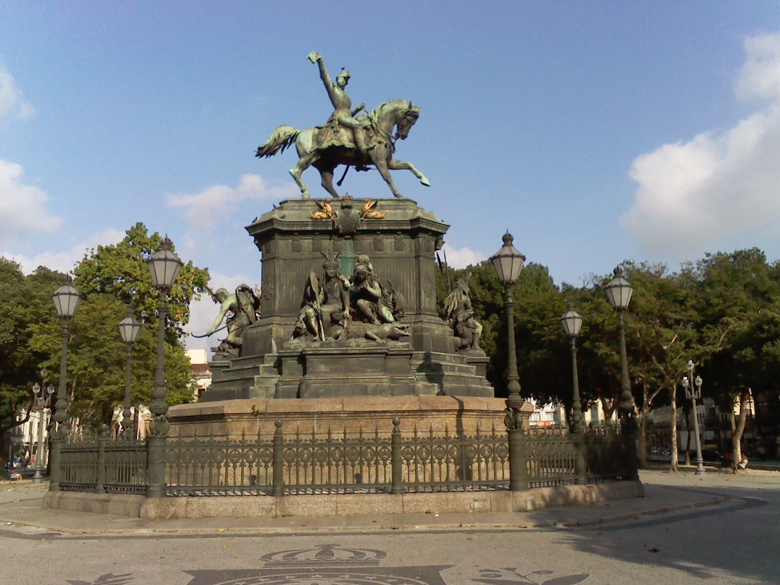 Monumento a D. Pedro I do Brasil, praça Tiradentes, centro histórico da cidade do Rio de Janeiro, estado do Rio de Janeiro, Brasil.